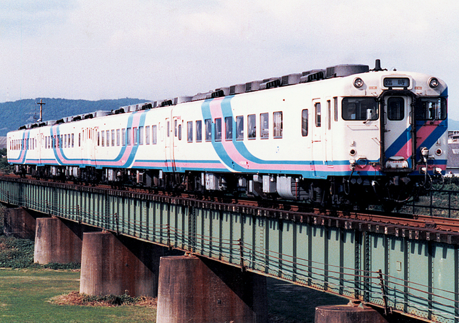 JR四国 キハ58系気動車 「レインボー」 キハ58 649